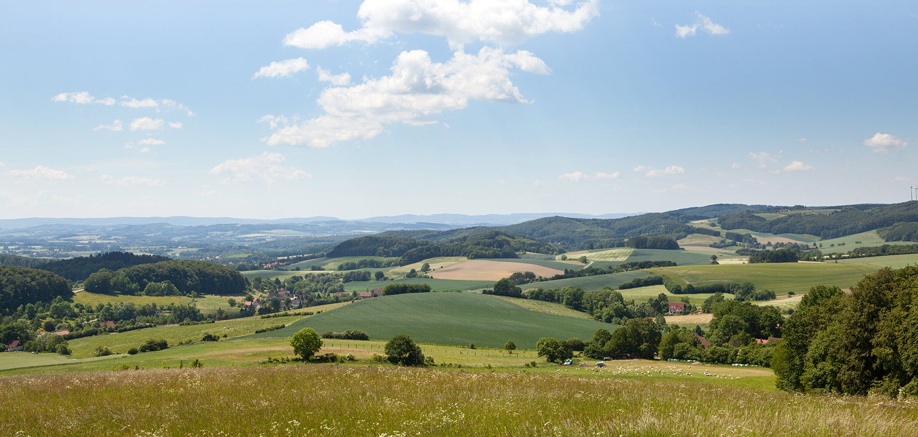 Lipper Bergland, Blick von Steinberg bei Schwelentrup Richtung Süd-West